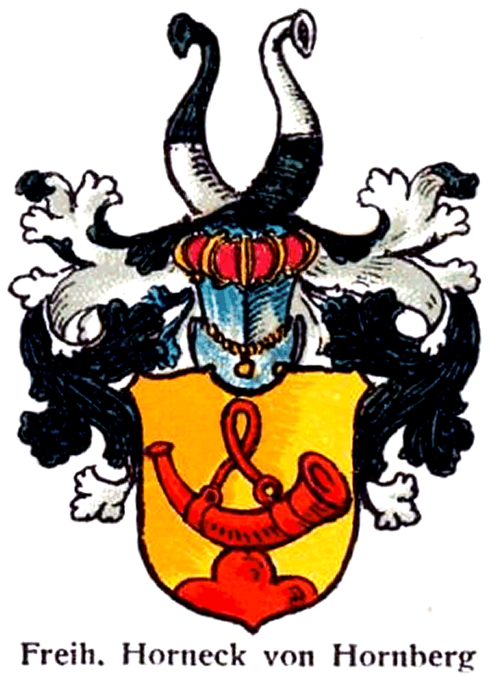 Wappen derer von Hompesch